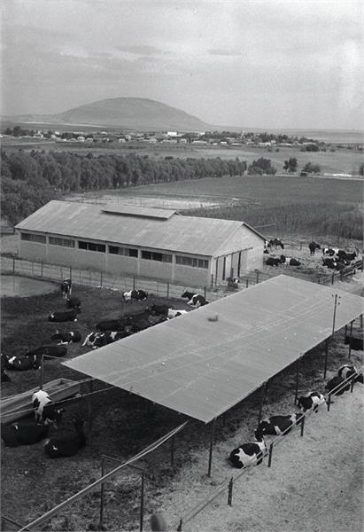 מזרע - הרפת במזרע - מרחוק תל עדשים והר תבור